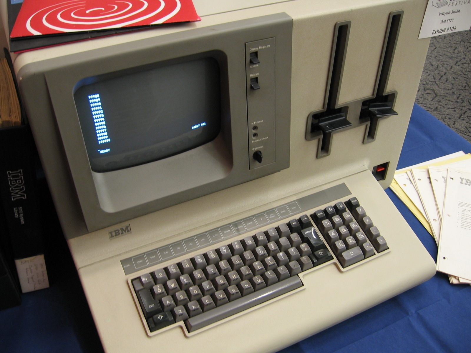 An IBM 5120